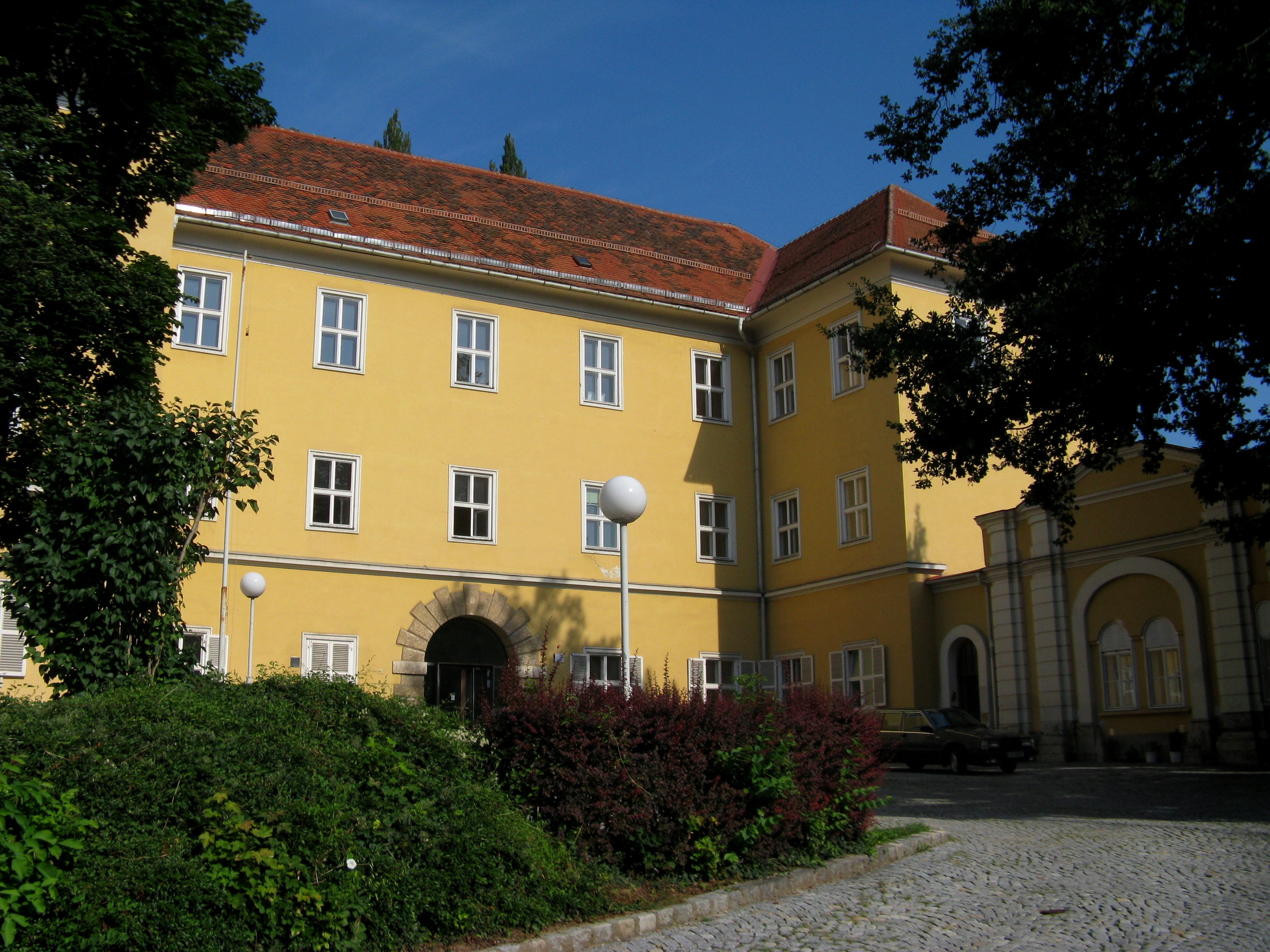 Bezirksgericht, Palmburg